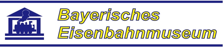 Logo Bayerisches Eisenbahnmuseum Nördlingen, Stand 09.2018